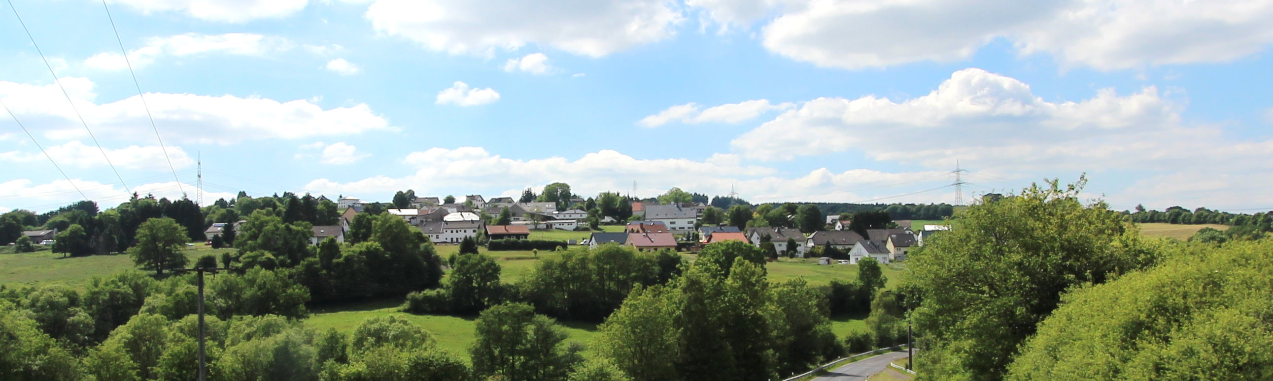 54589 Kerschenbach, westlich von Kerschenbach in Richtung Stadtkyll auf der K 64. Aufnahme von 2017.